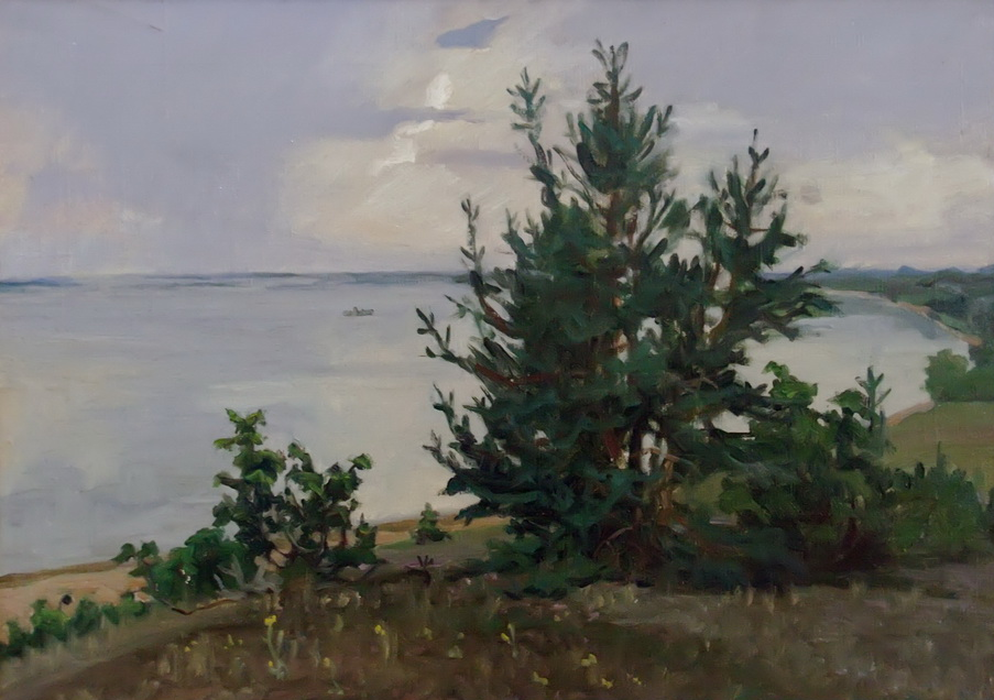 Вечер на озере Нарочь, 1951